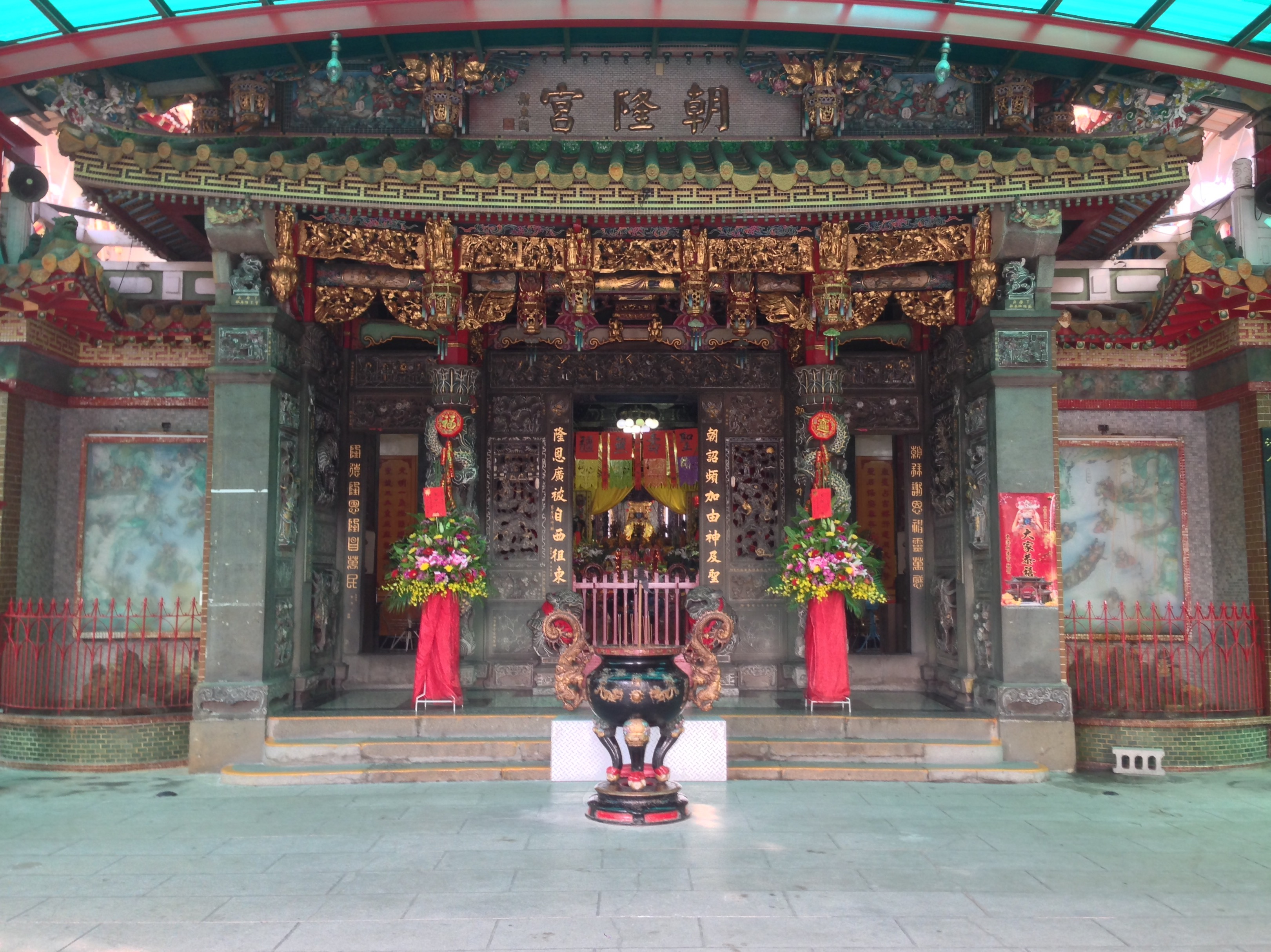 中文（台灣）: 東港朝隆宮三川殿